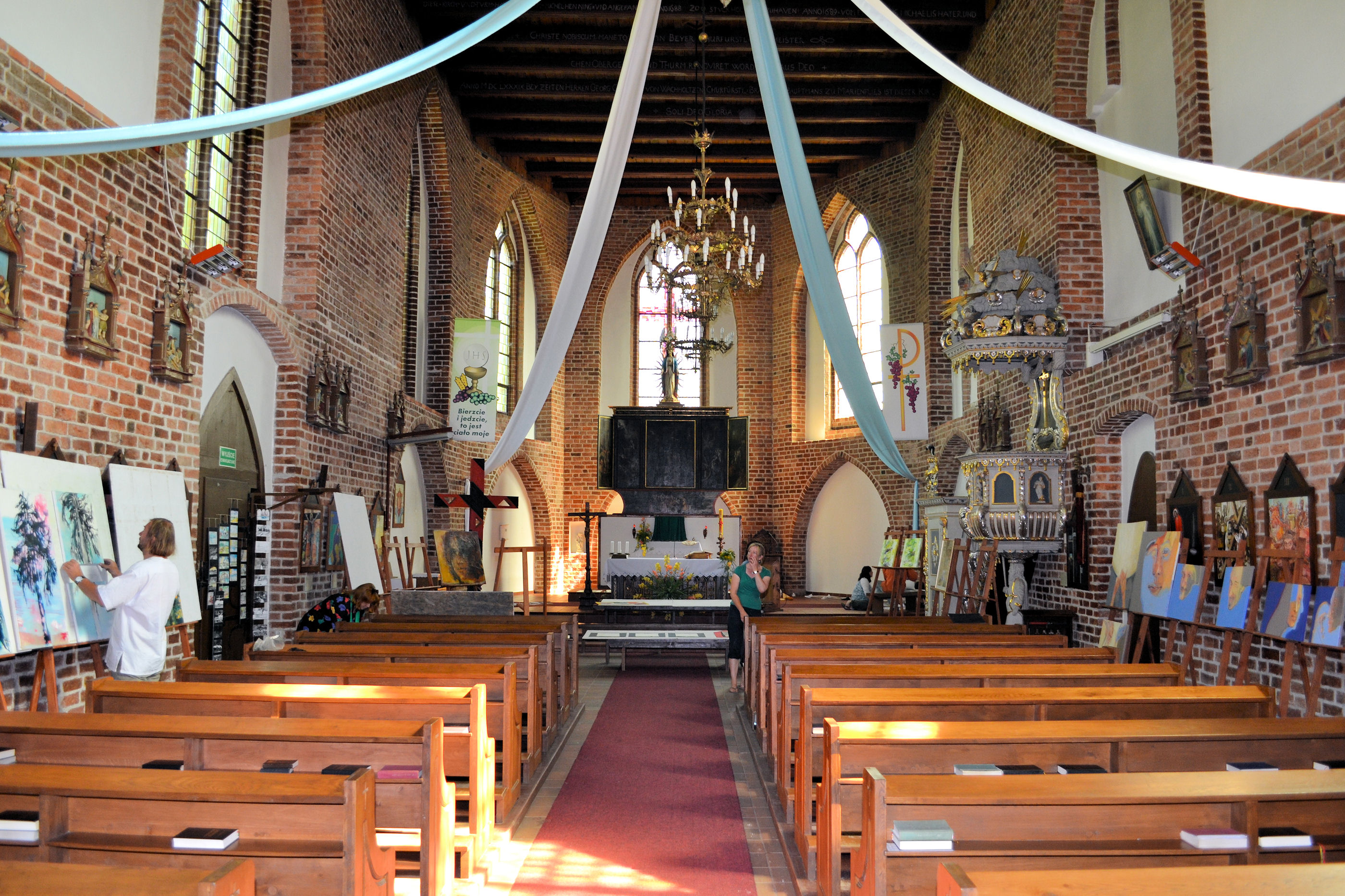 Marianowo - zespół klasztorny cystersów